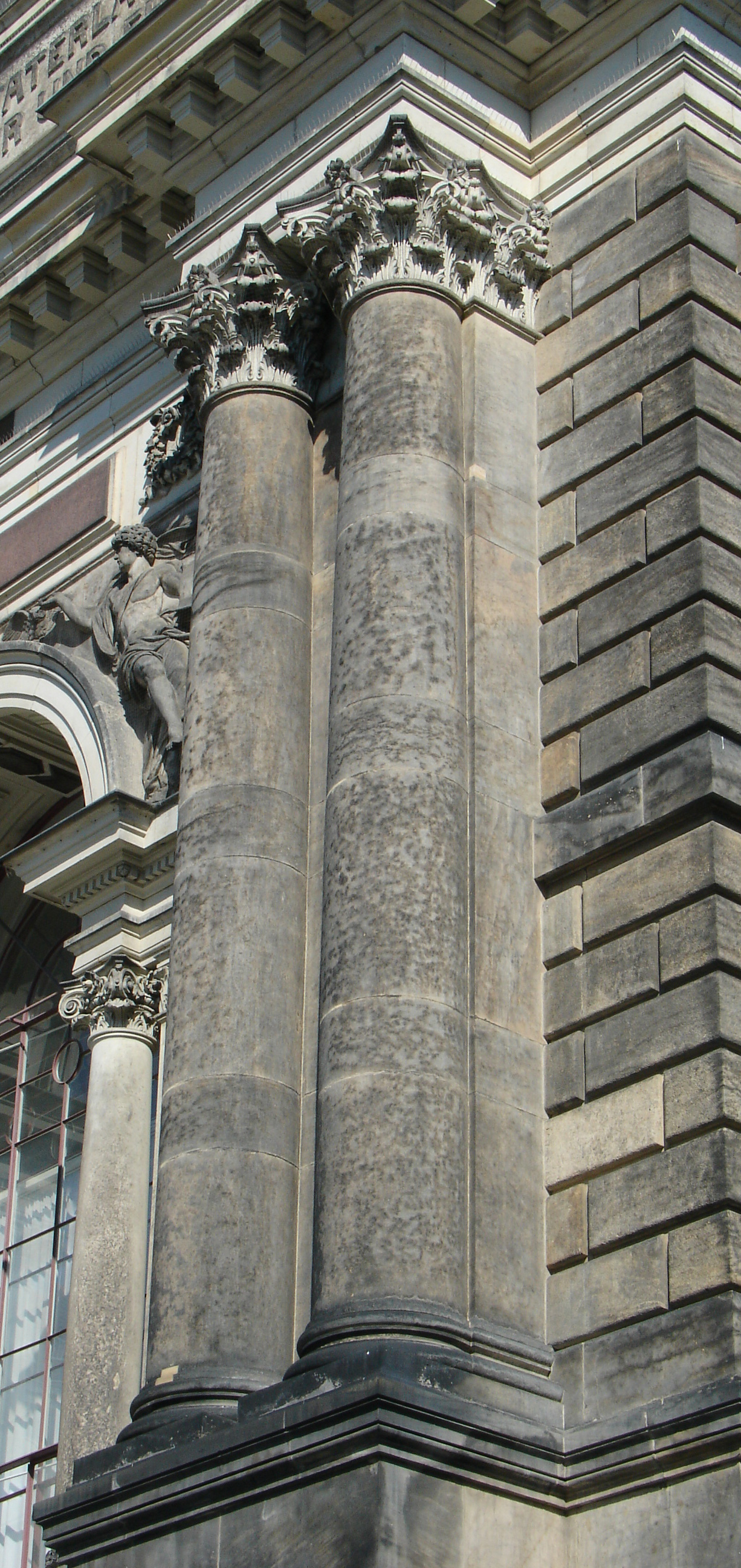 Półkolumny